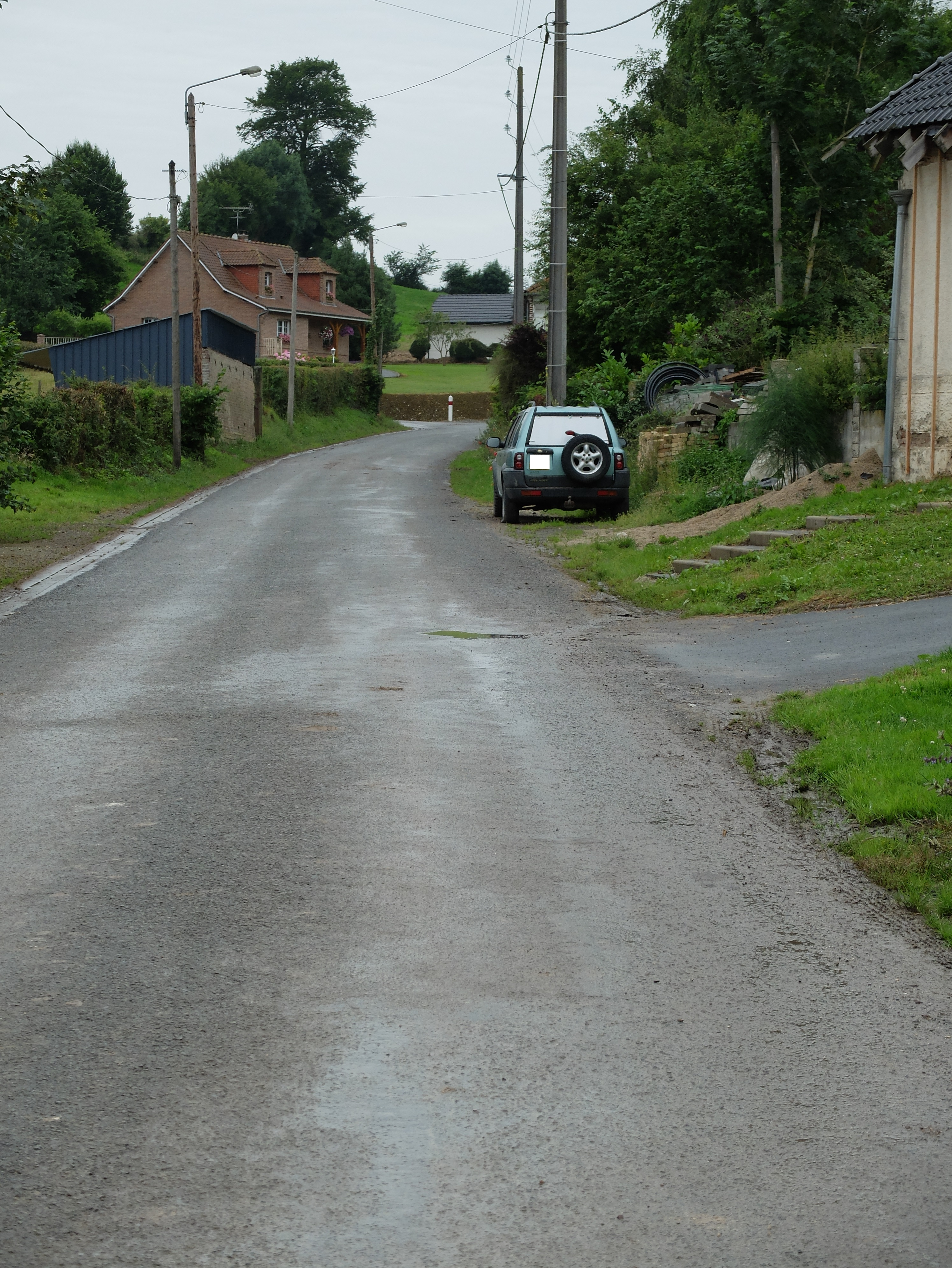 Vue de la rue principale de Blangerval-Blangermont.